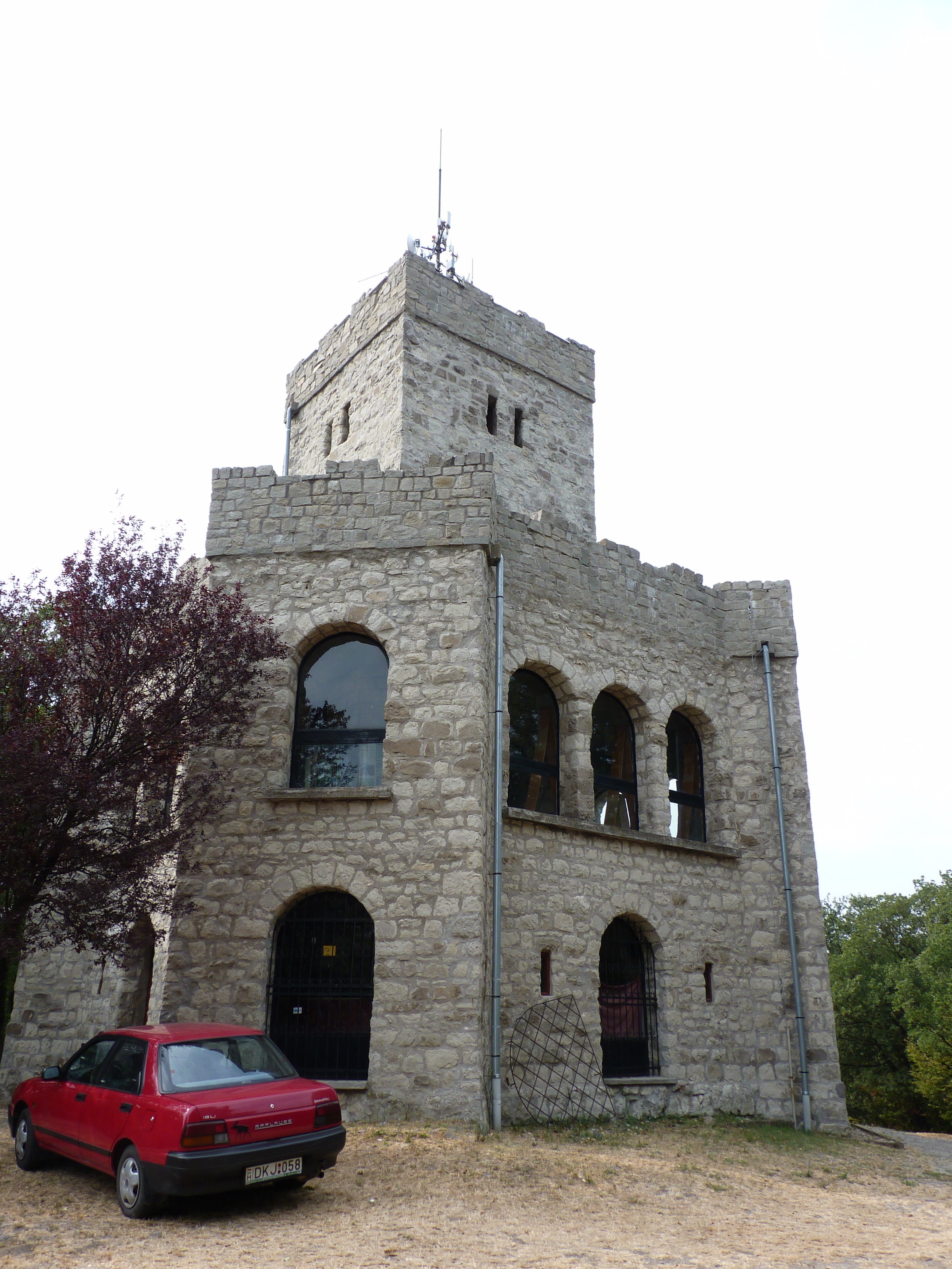 Zsitvay-kilátó This is a photo of a monument in Hungary. Identifier: 11692